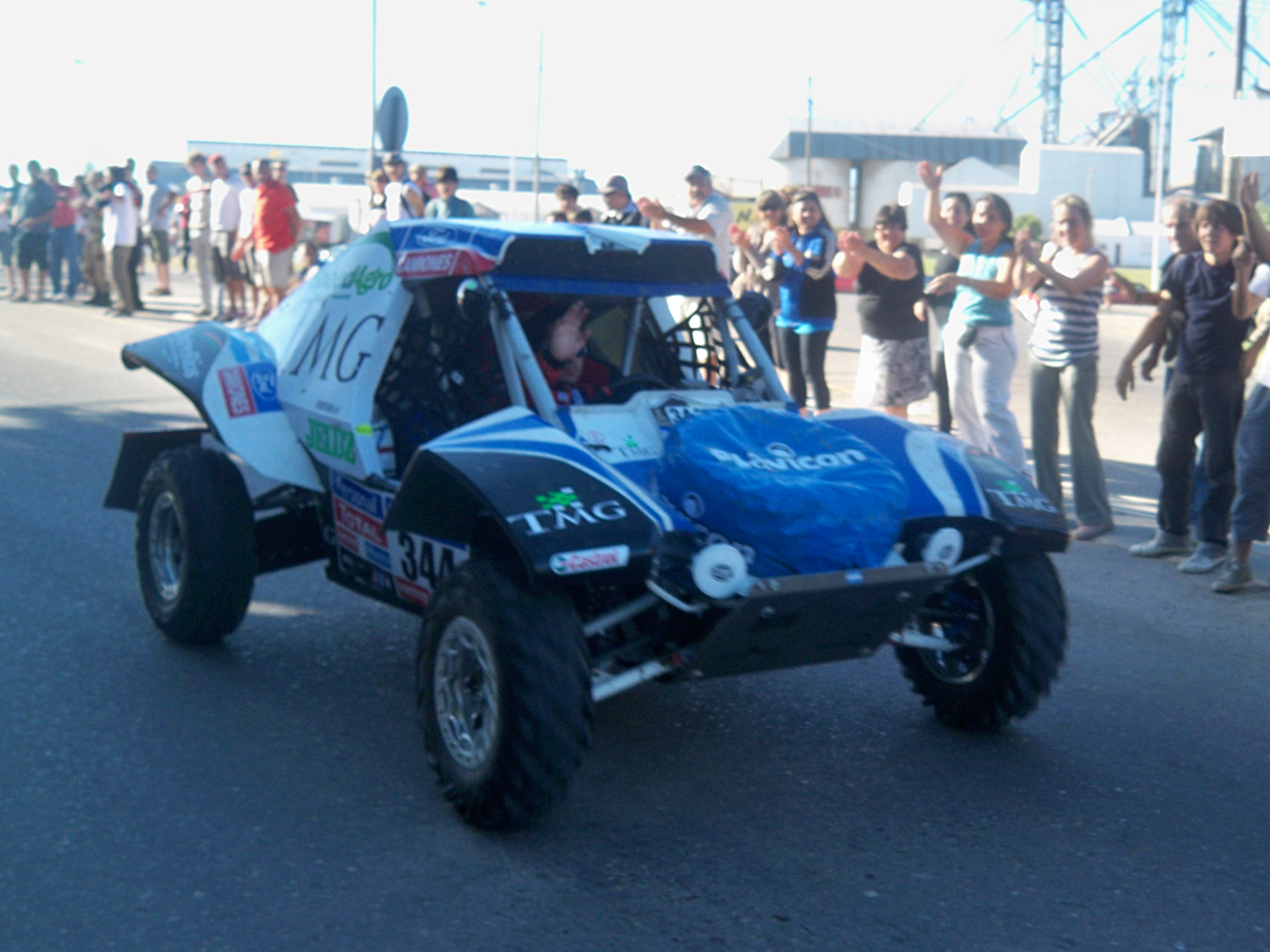 Norberto Fontana en el Rally Dakar 2011, en Victoria (Entre Ríos)